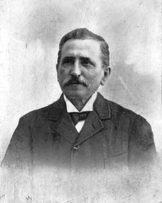 Antonio Alonso Santodomingo